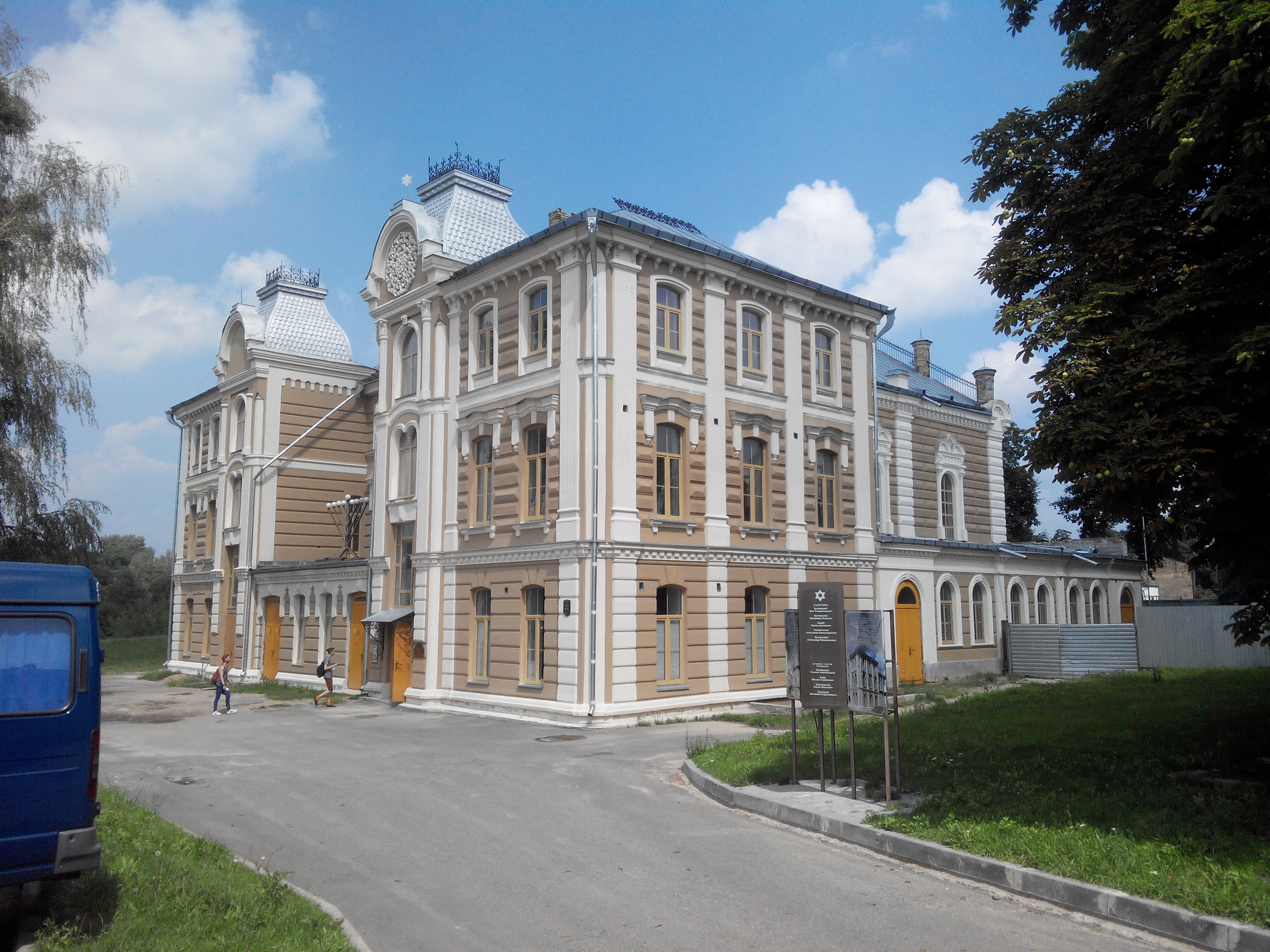 Будынак Вялікай харальнай сінагогі ў Гродна, Беларусь (вул. Вялікая Траецкая, 59А).